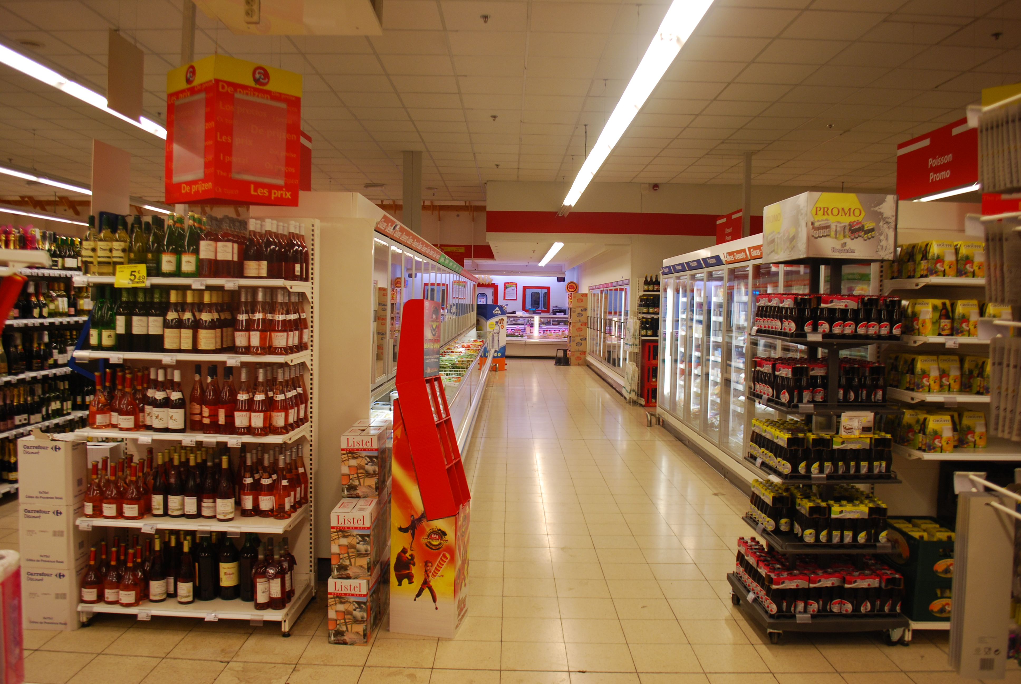 Vue des rayons du supermarché Carrefour GB à Barvaux.